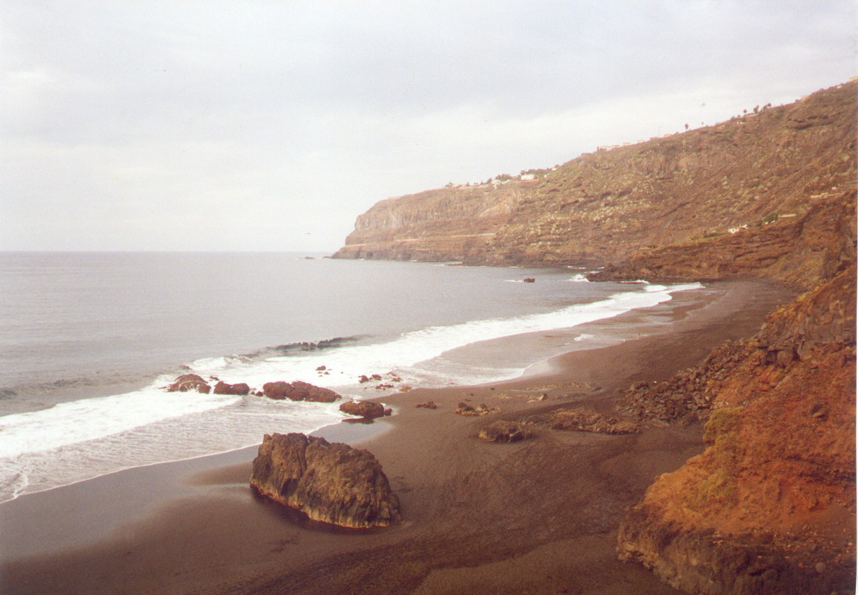 Playa de Los Patos del municipio de La Orotava en verano